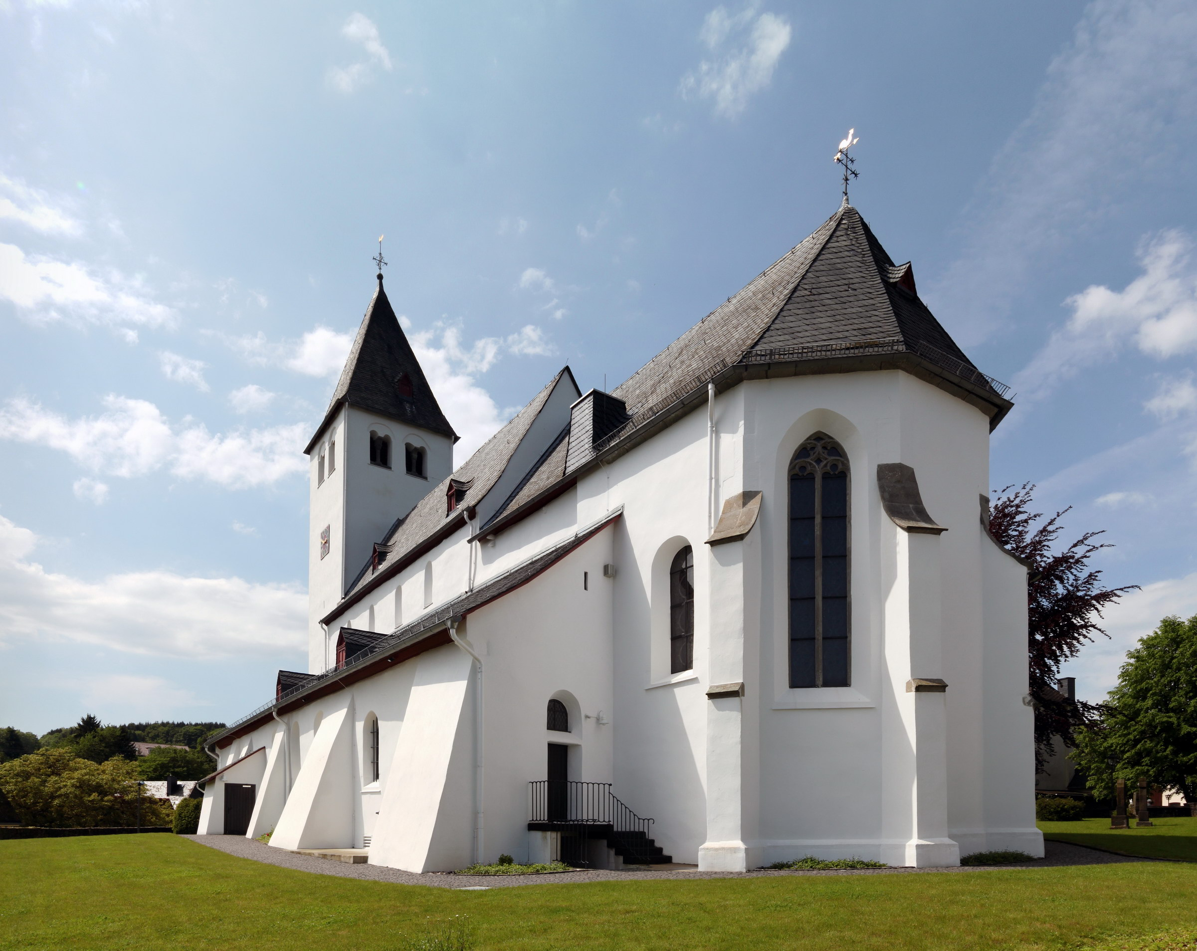 Katholische Pfarrkirche St. Adelphus in Salz, Westerwald